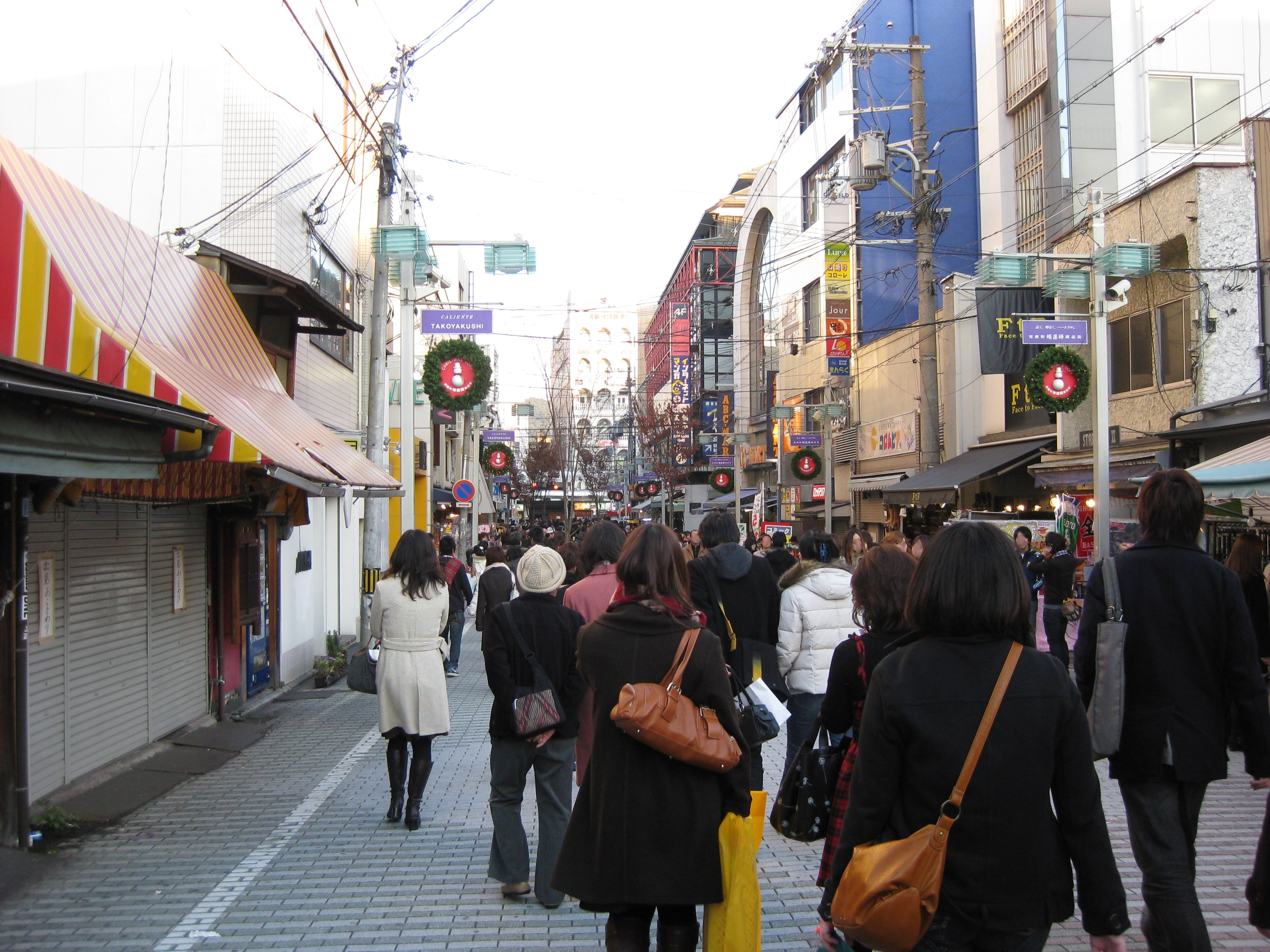 蛸薬師通 新京極から河原町方面